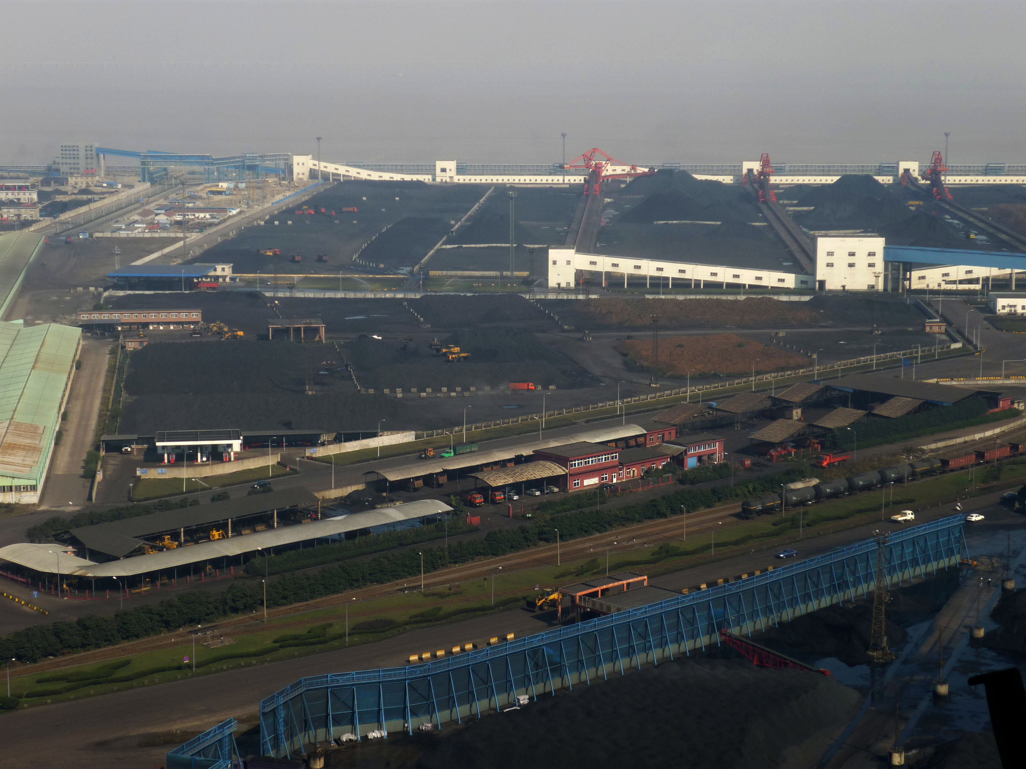 镇海港区煤场